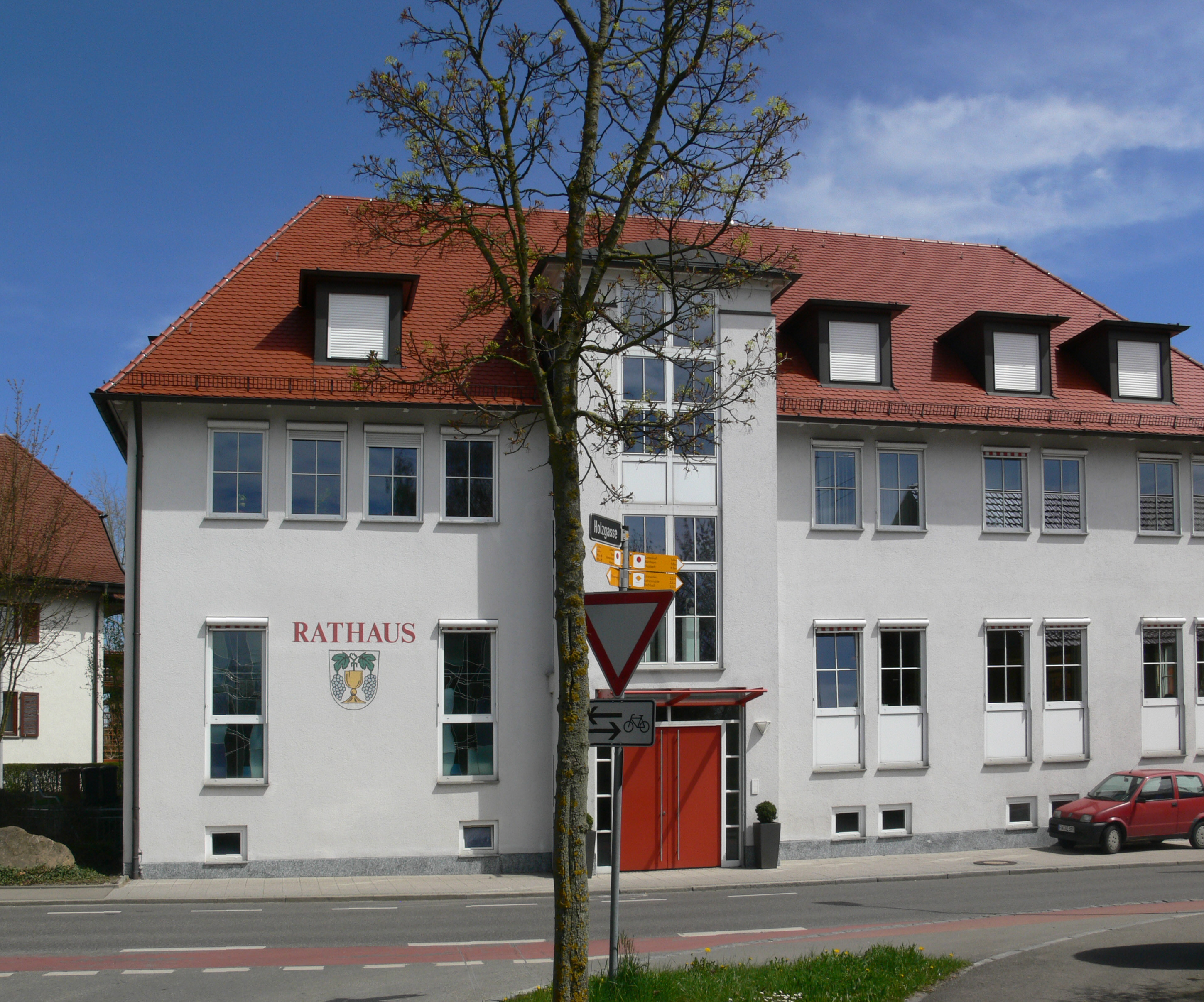 Kluftern (Ortsteil von Friedrichshafen), Bodenseekreis Rathaus (Ortschaftsverwaltung) Kluftern